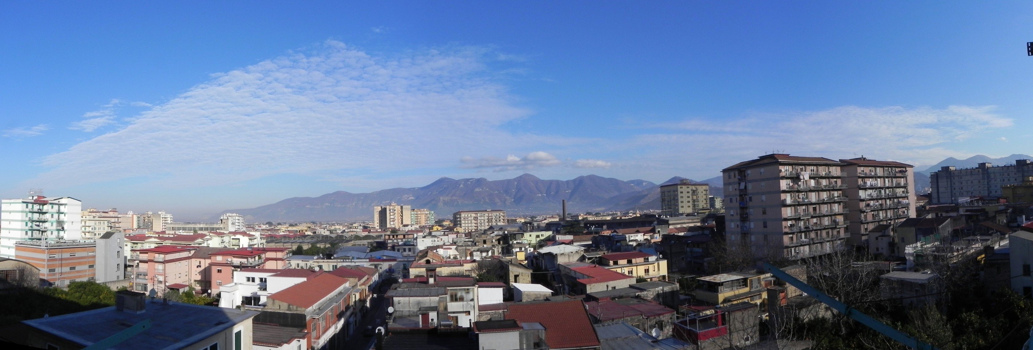 Panorama di Pagani e della Valle del Sarno